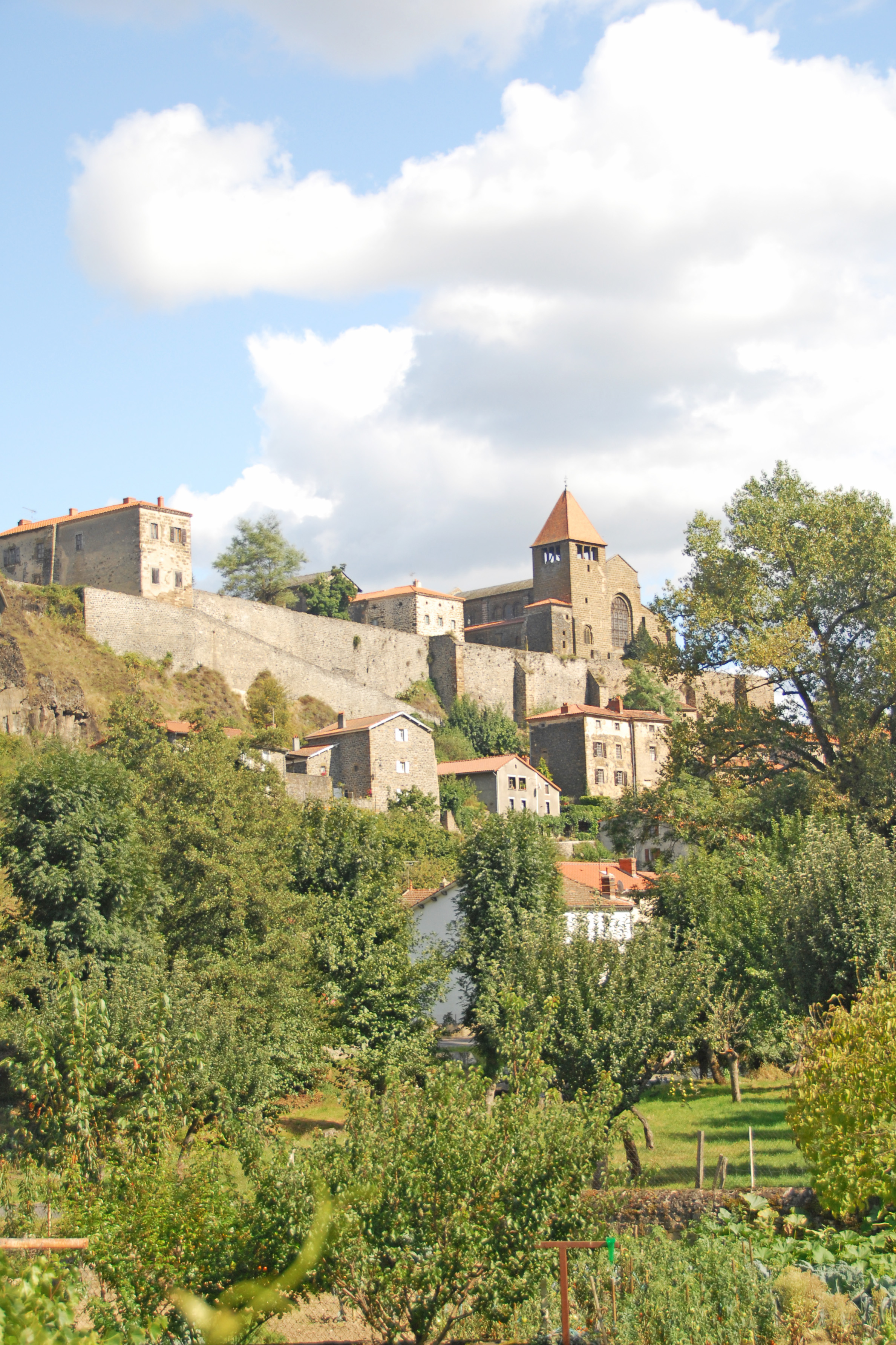 Chanteuges, Blick von NW